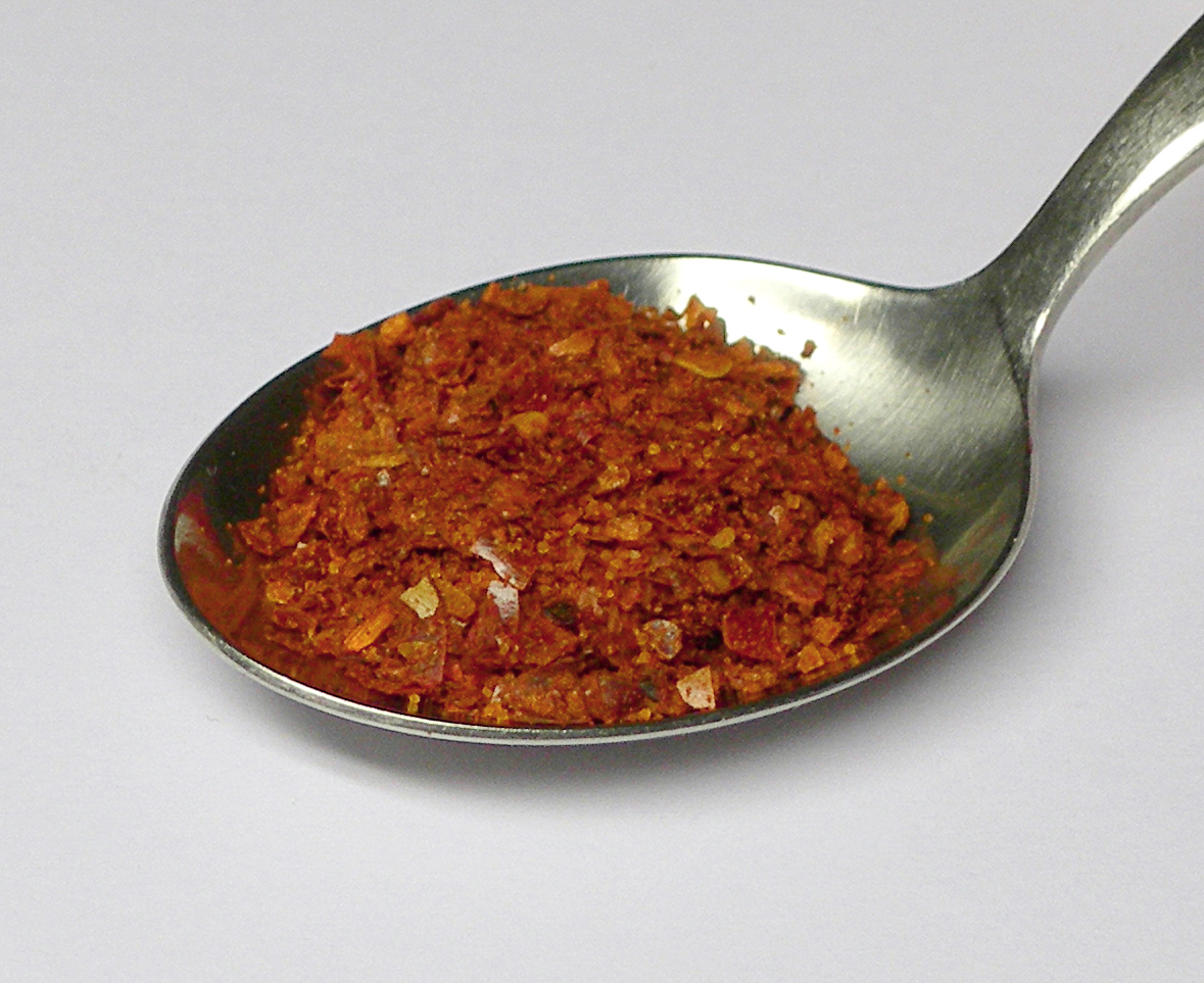 Pul biber, eine türkische Gewürzmischung aus Chili und Salz